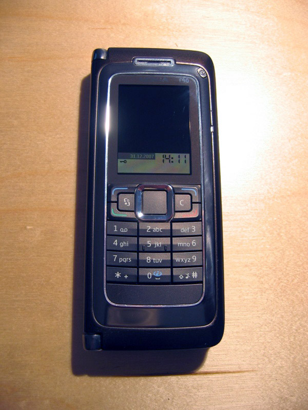 Nokia E90 Communicator - Vorderansicht